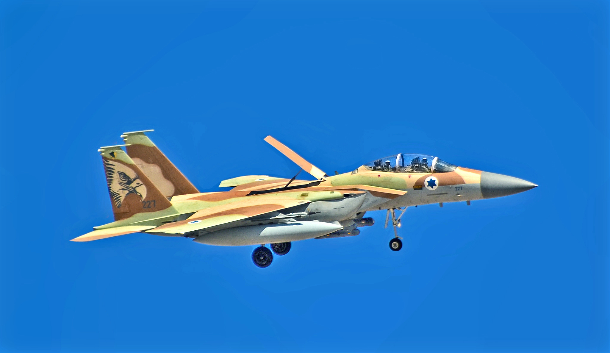 RED FLAG 15-4 August 17 to 28 Las Vegas - Nellis AFB (LSV / KLSV) TDelCoro August 24, 2015